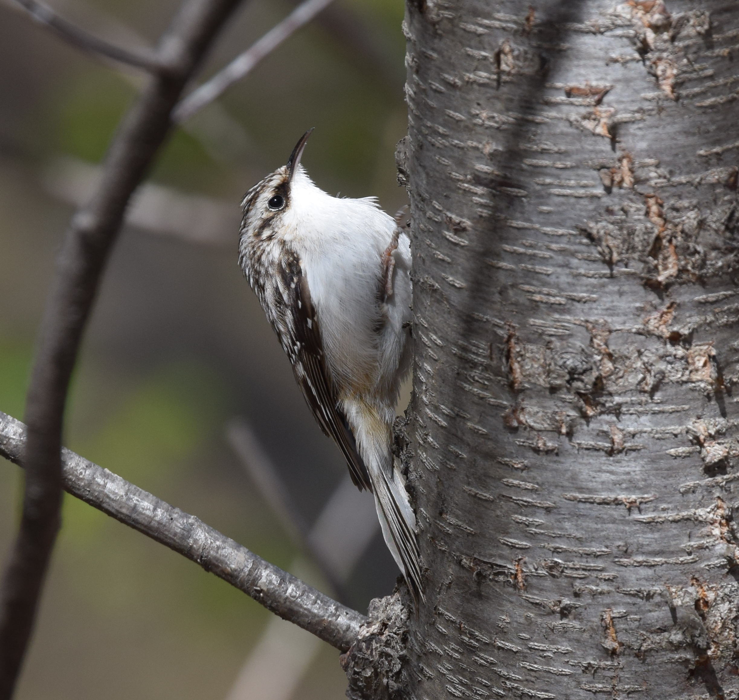 Carondelet Park 4/8/16